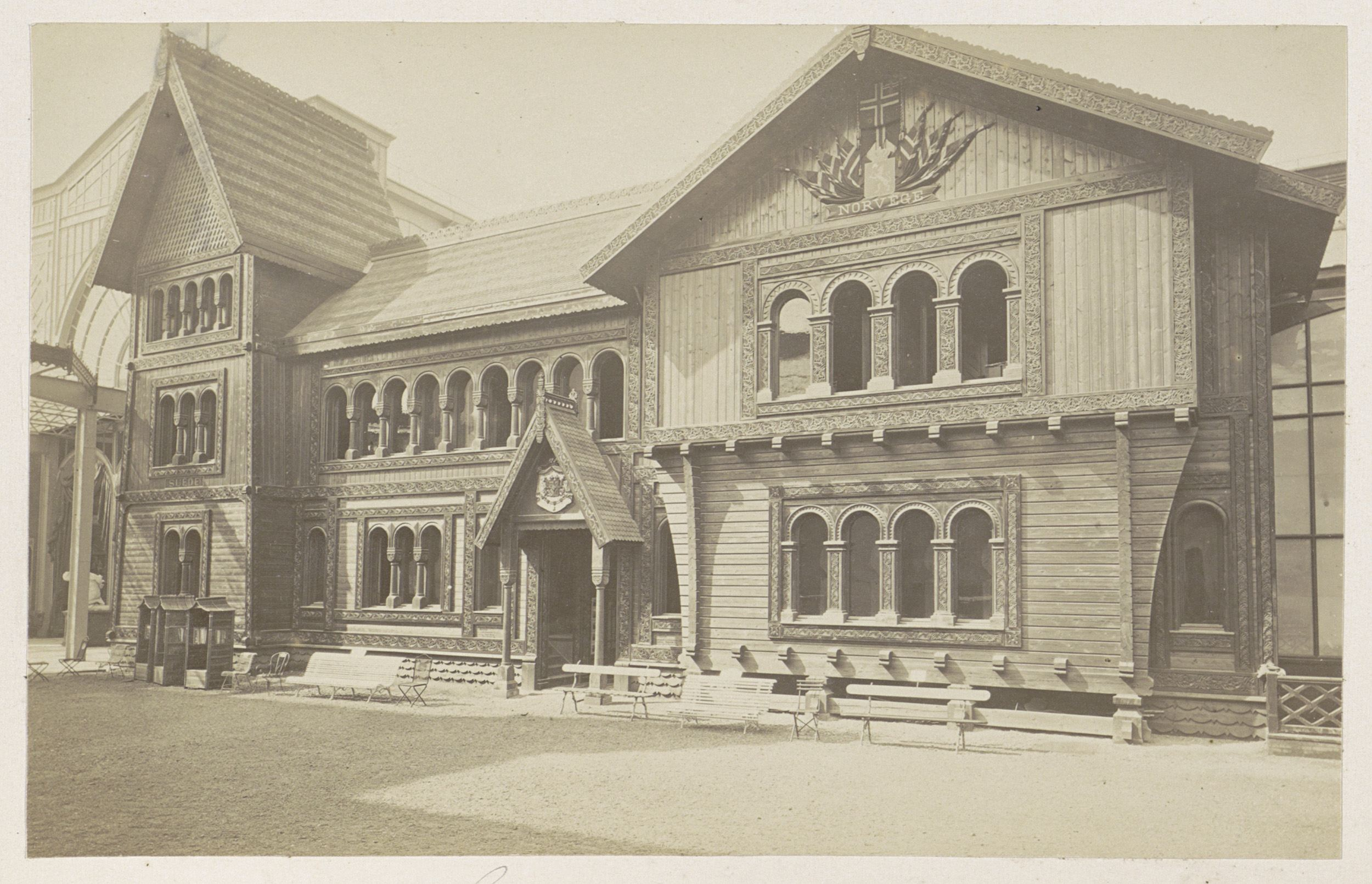 IdentificatieTitel(s): Zweeds paviljoen op de Wereldtentoonstelling te Parijs in 1878. Sverige (titel op object)Objecttype: foto Objectnummer: RP-F-F01212-37-4Omschrijving: Onderdeel van Reisalbum Europese steden, vermoedelijk Zweeds.VervaardigingVervaardiger: fotograaf: anoniemPlaats vervaardiging: ParijsDatering: 1878Fysieke kenmerken: albuminedrukMateriaal: fotopapier Techniek: albuminedrukAfmetingen: h 55 mm × b 94 mmToelichtingOp de foto rechtsboven is het woord 'Norvege' (Noorwegen) leesbaar. Noorwegen behoorde van 1814 tot 1905 bij Zweden.OnderwerpWat: world fair, world exhibitionfaçade (of house or building)Wanneer: 1878-05-06 - 1878-10-31Waar: ParijsVerwerving en rechtenVerwerving: overdracht van beheer 1994Copyright: Publiek domein